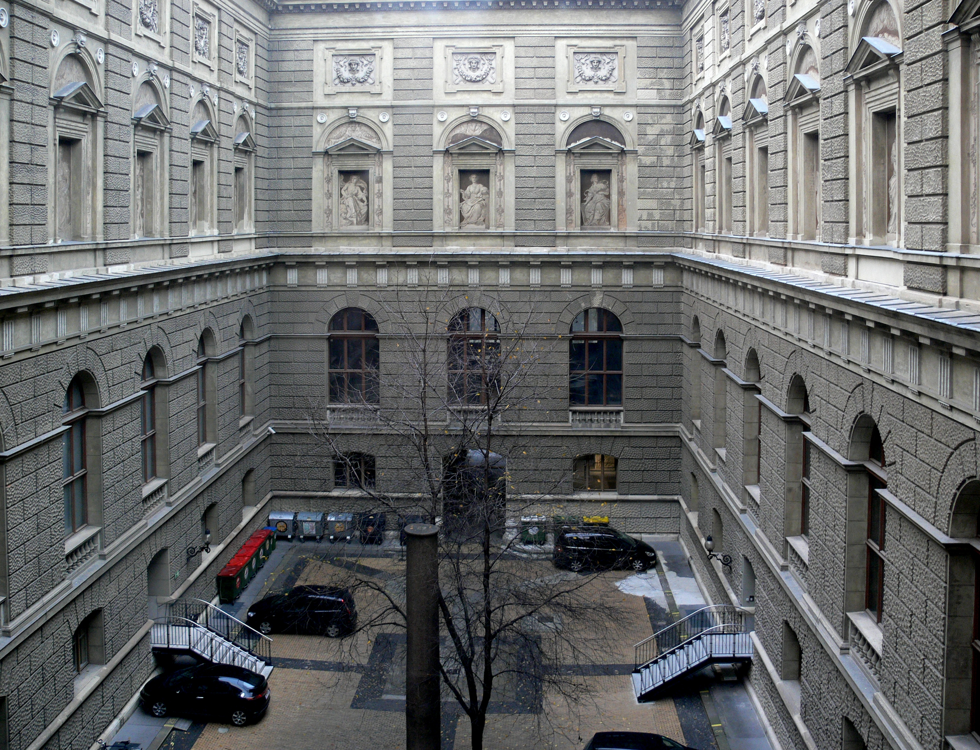 Wien, Kunsthistorisches Museum Innenhof